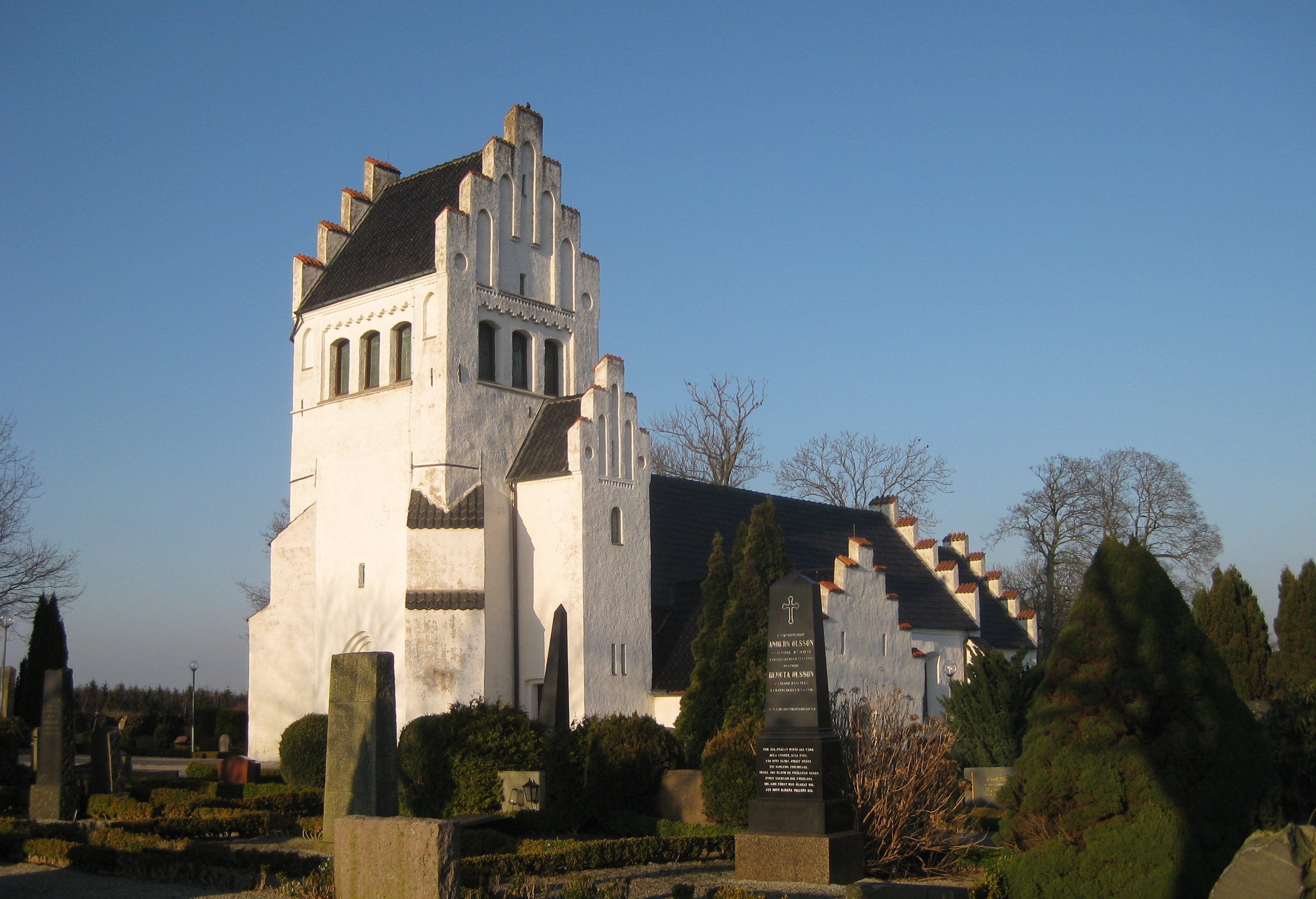 Hardeberga kyrka